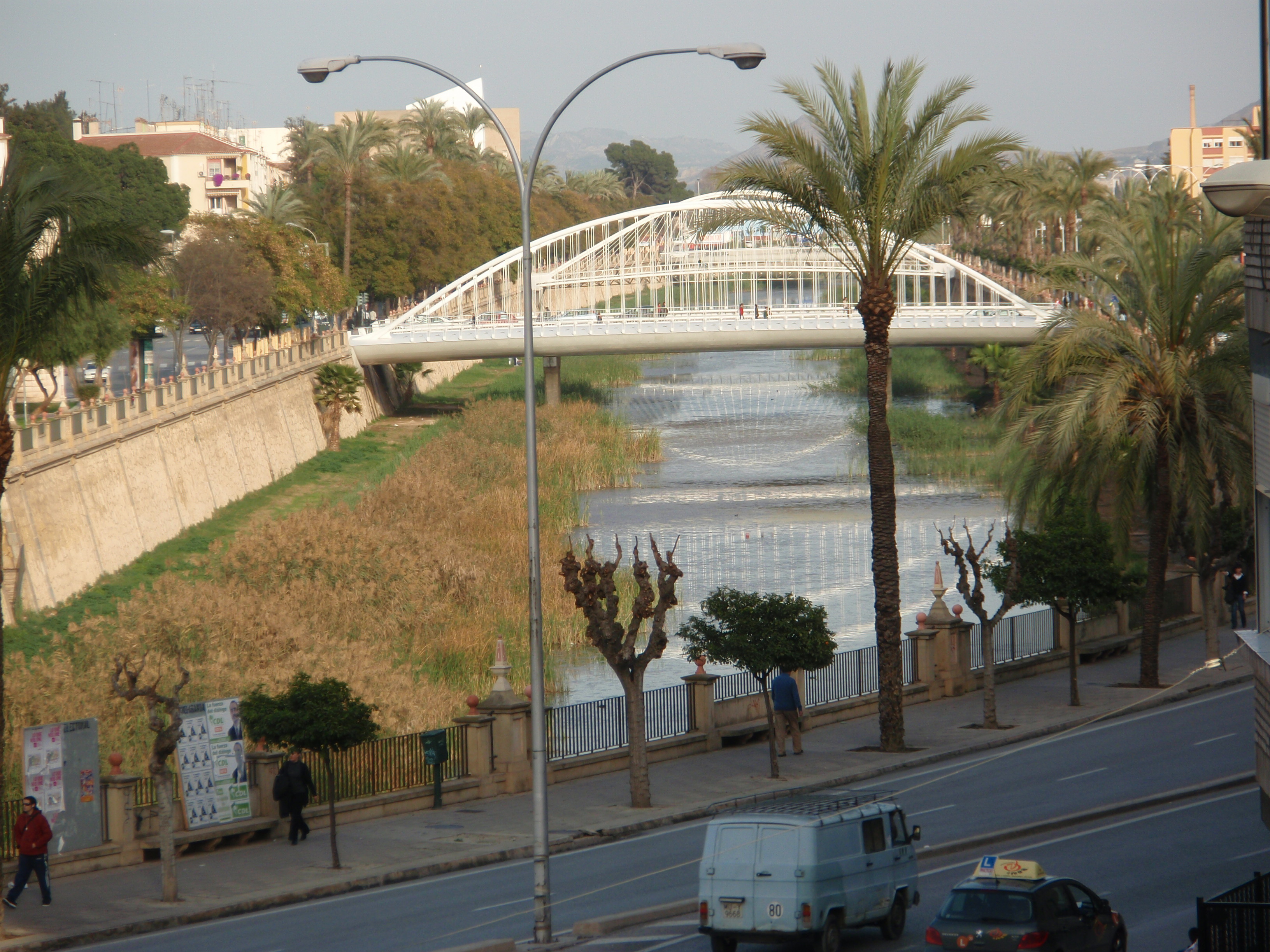 Murcia: Puente del Hospital (sobre el río Segura) de Santiago Calatrava